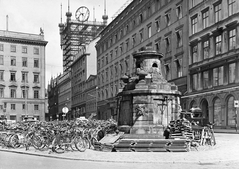 Brunkebergstorg från sydväst. Cykelparkering vid pumpen. I bakgrunden skymtar Telefontornet